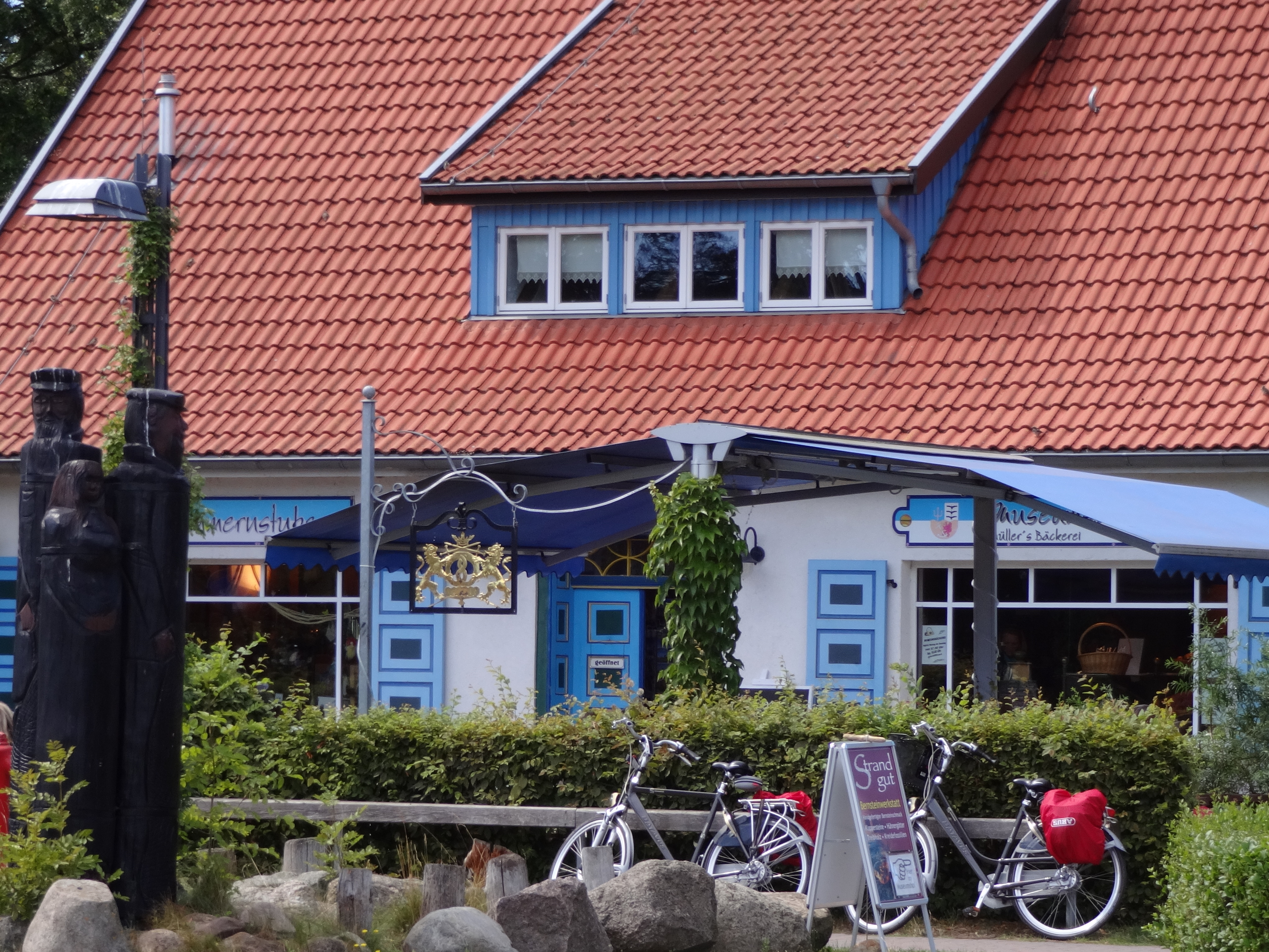 Museumshof in Zingst (Mecklenburg-Vorpommern) Pommernstube (links) und Museumsbäckerei (rechts)